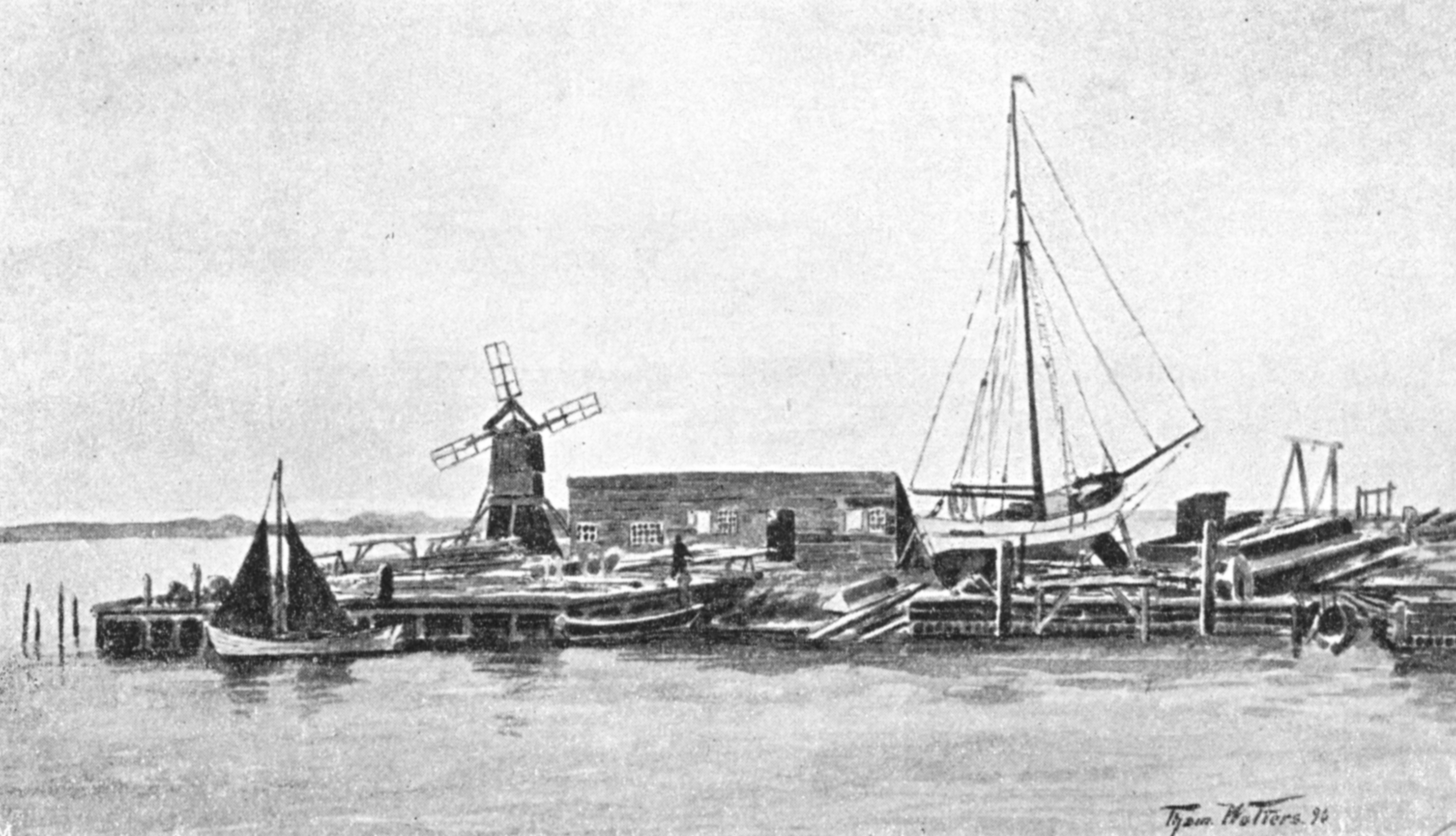 Hafen von Burgstaaken auf Fehmarn, von Thomas Wolters